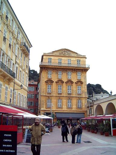 Limburgs: Woonhoes van Henri Matisse in Nice